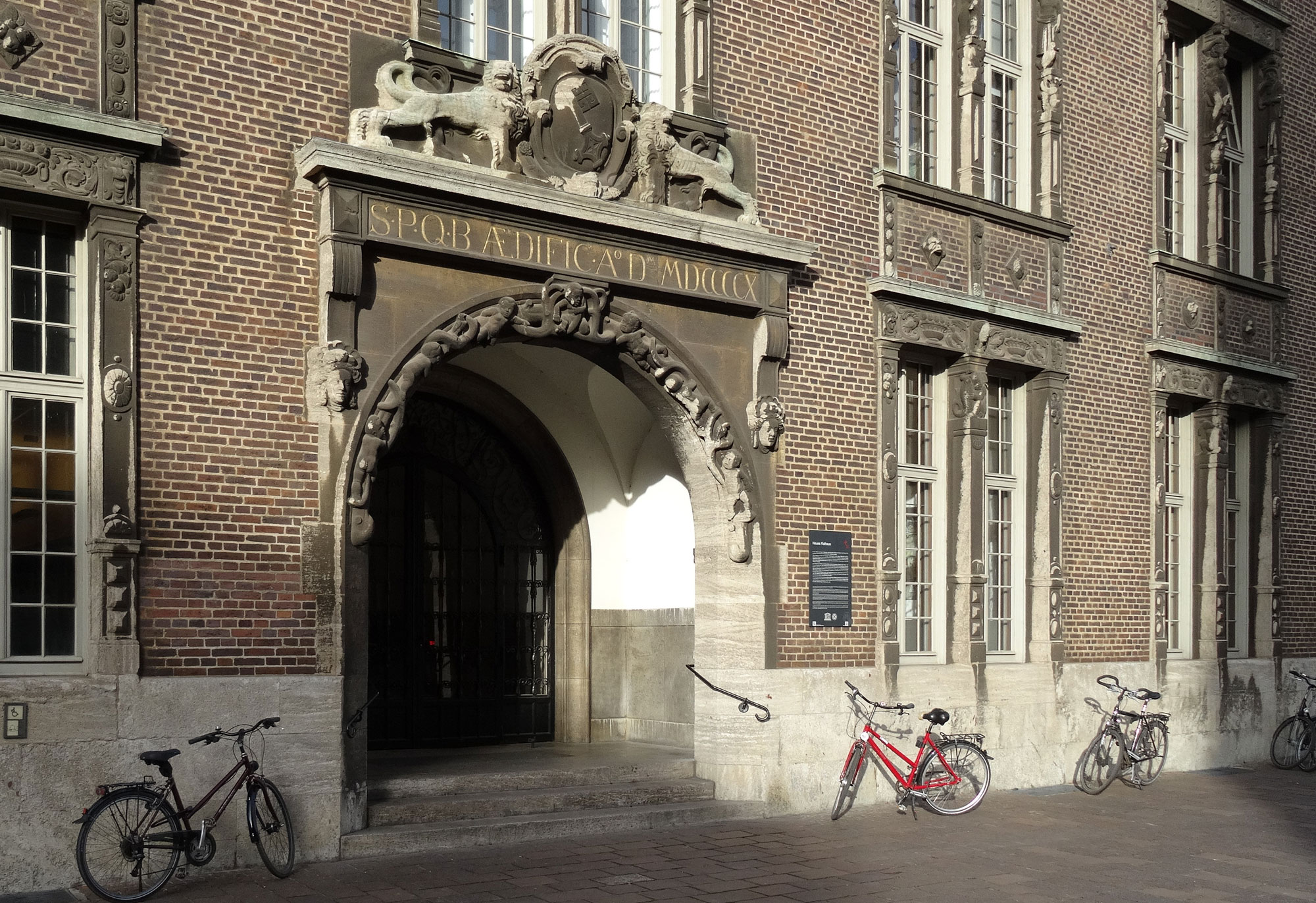 Infotafel mit QR- und QRpedia-Code: Neues Rathaus (Bremen)